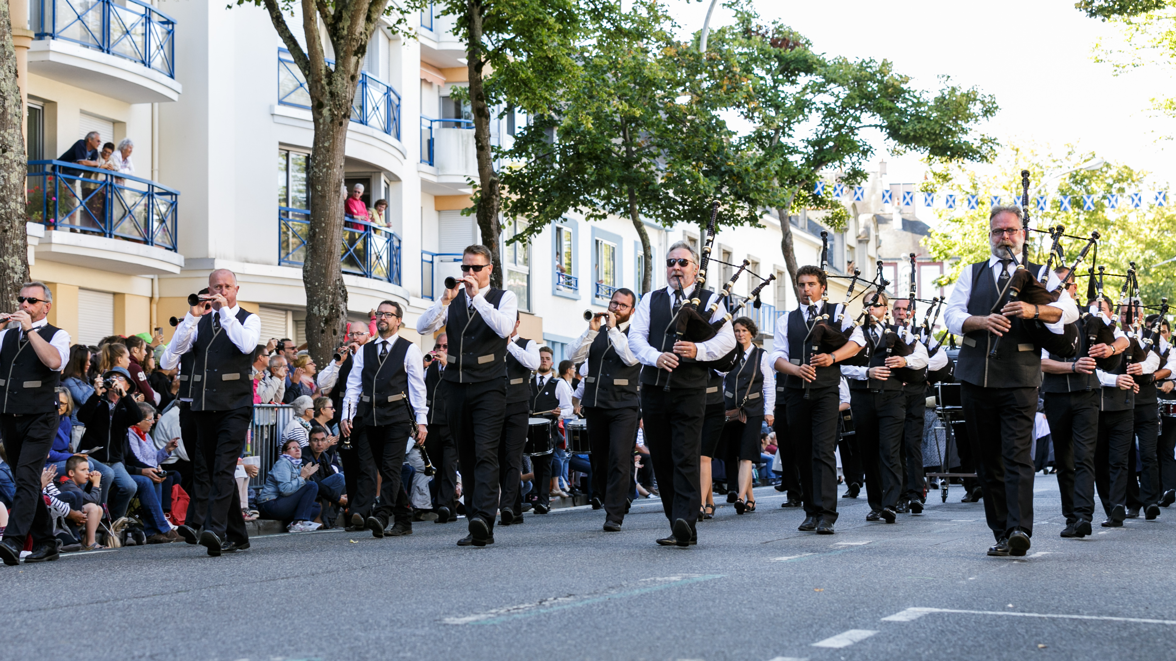 Festival Interceltique de Lorient 2017 - Grande parade des nations celtes - Bagad Quic-en-Groigne